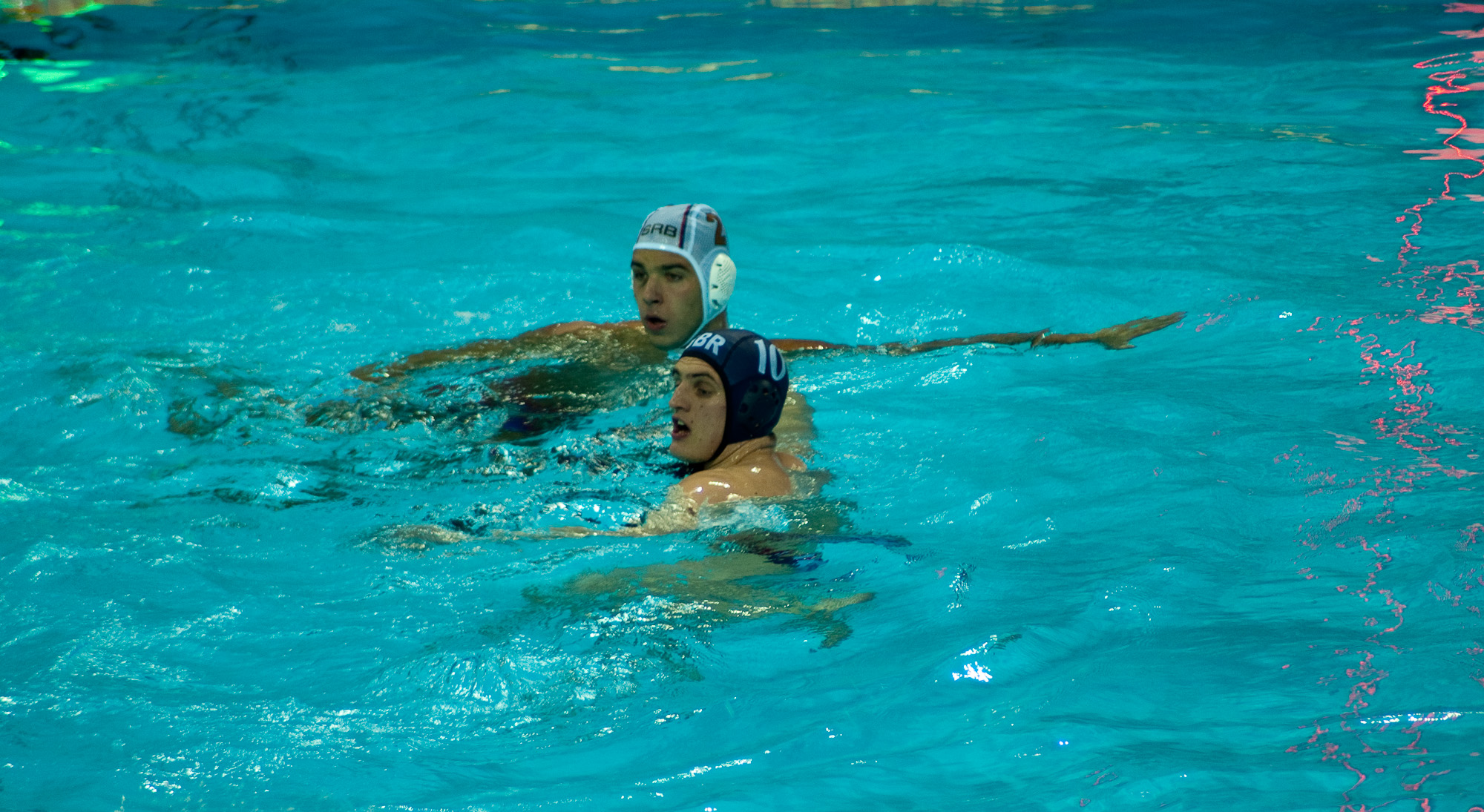 GB v Serbia